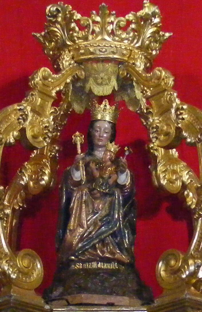 Virgen de la Victoria